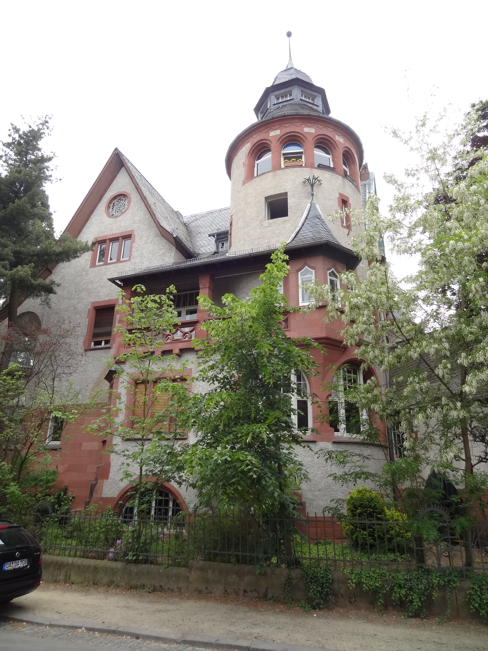 Haus Haardteck, Herdweg 79 in Darmstadt